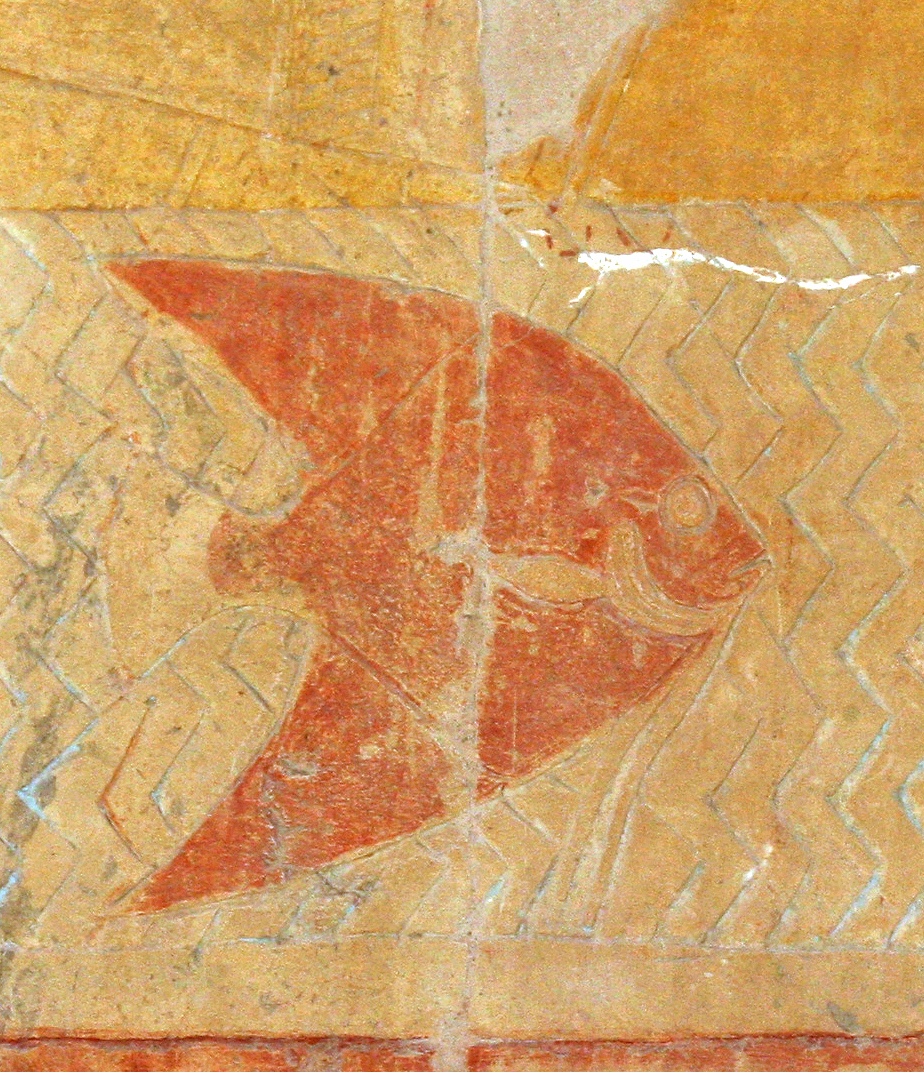 Zeichnung am Hatschepsut-Tempel in Deir-el-Bahri, Oberägypten. Punthalle, Motiv: Schiffe werden von Fischen umschwärmt, Detail der Fisch-Abbildung